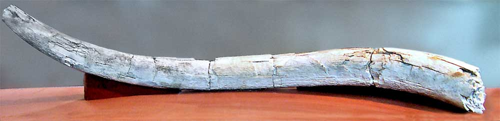 Defensa de Palaeoloxodon antiquus (o Elephas antiquus) procedente de la segunda terraza fluvial del río Duero, en la localidad de Villanueva de Duero (Valladolid). Mide 210 cm y se le estima una edad que ronda los 200 000 años Museo Arqueológico de Valladolid